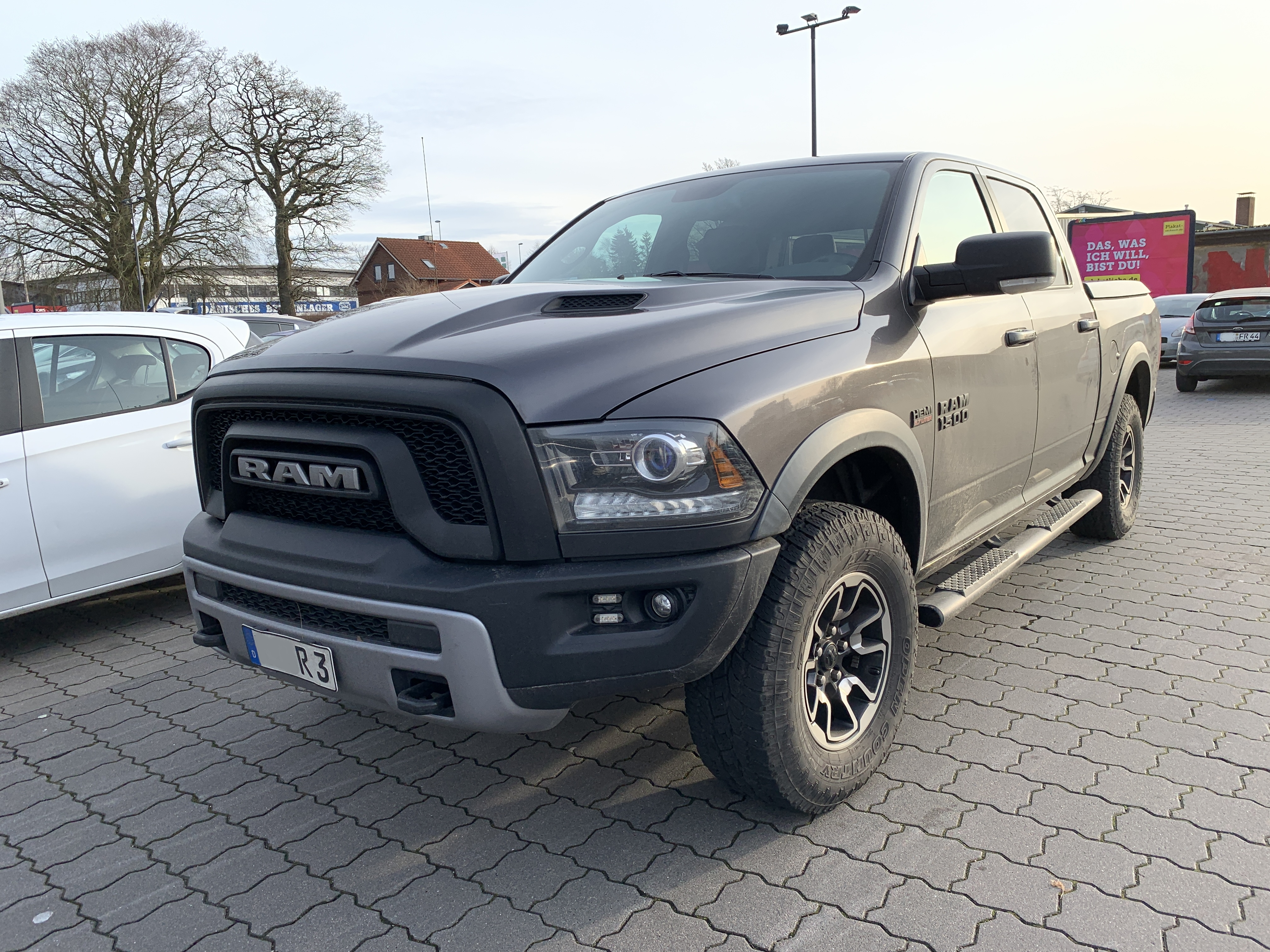 Dodge RAM 1500 Rebel Frontansicht